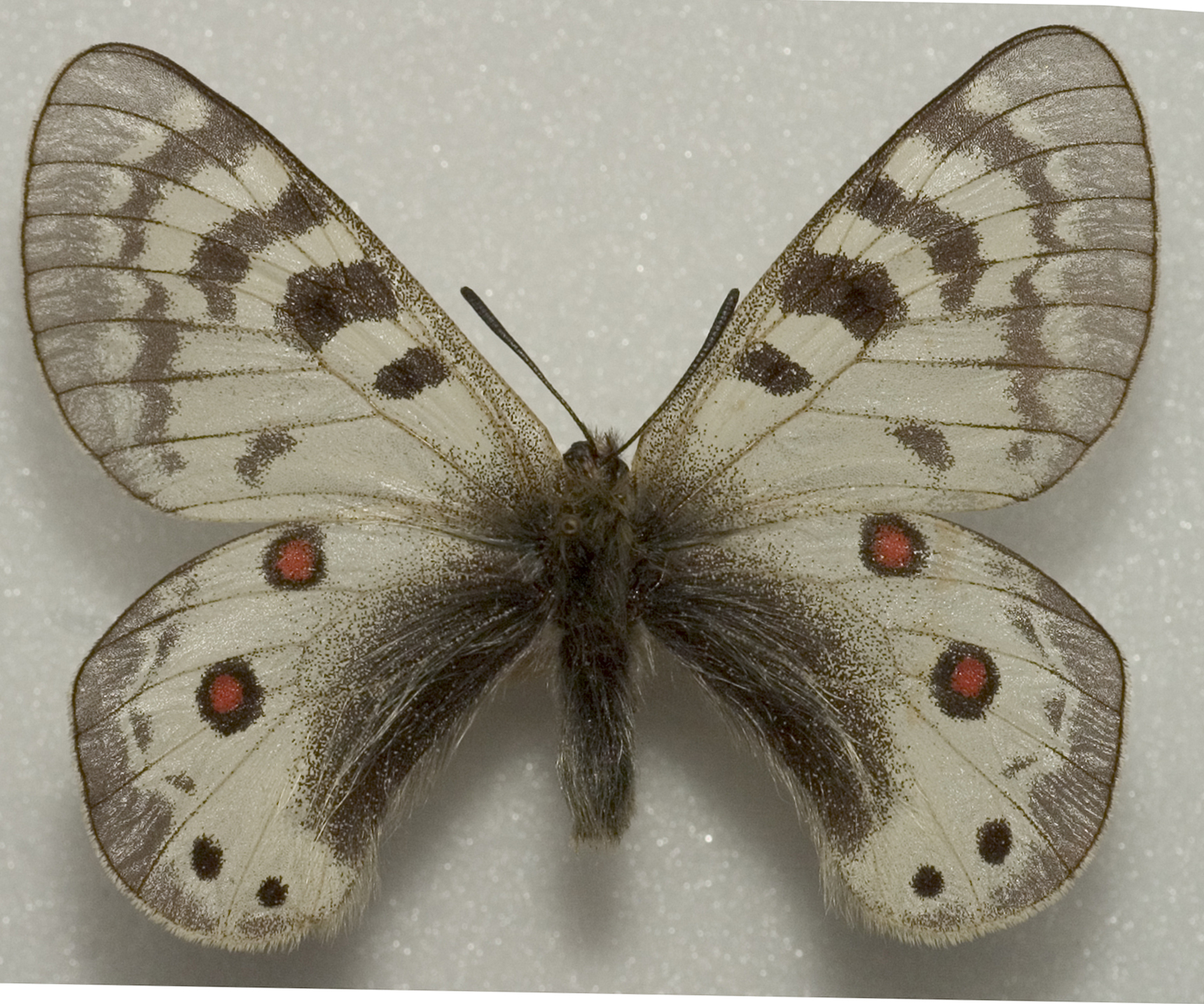 Male Paranassius cardinal Gr.Gr. 7. 7. [18} 86 Trans Alai Aram Kungei Ex Elwes Ex Hill Museum cardinal Gr.Gr.